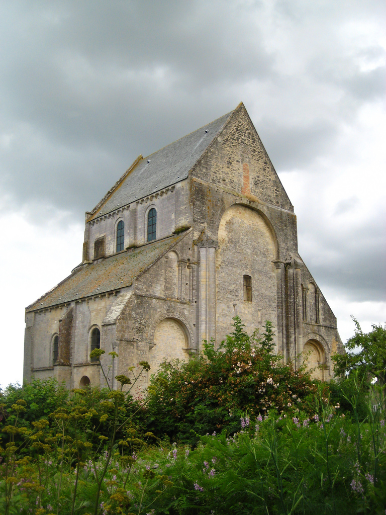 église du prieuré Saint-Gabriel à Saint-Gabriel-Brécy dans le Calvados (Basse-Normandie, France).